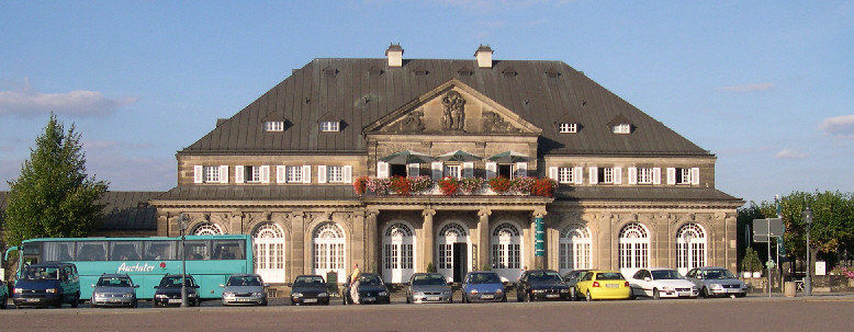 Italienisches Dörfchen, Dresden. Seen from Theaterplatz.